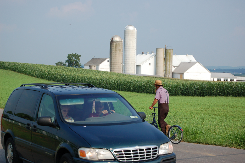 Modern meets not so Modern